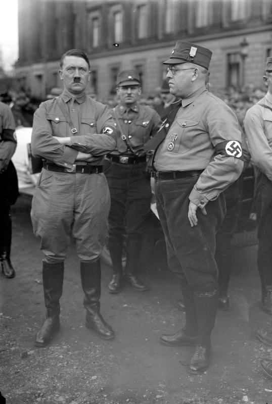 Der braunschweigische Innenminister Dr. Franzen zurückgetreten! Der nationalsozialistische braunschweigische Innenminister Dr. Franzen in nationalsozialistischer Uniform, welcher von seinem Posten zurückgetreten ist.